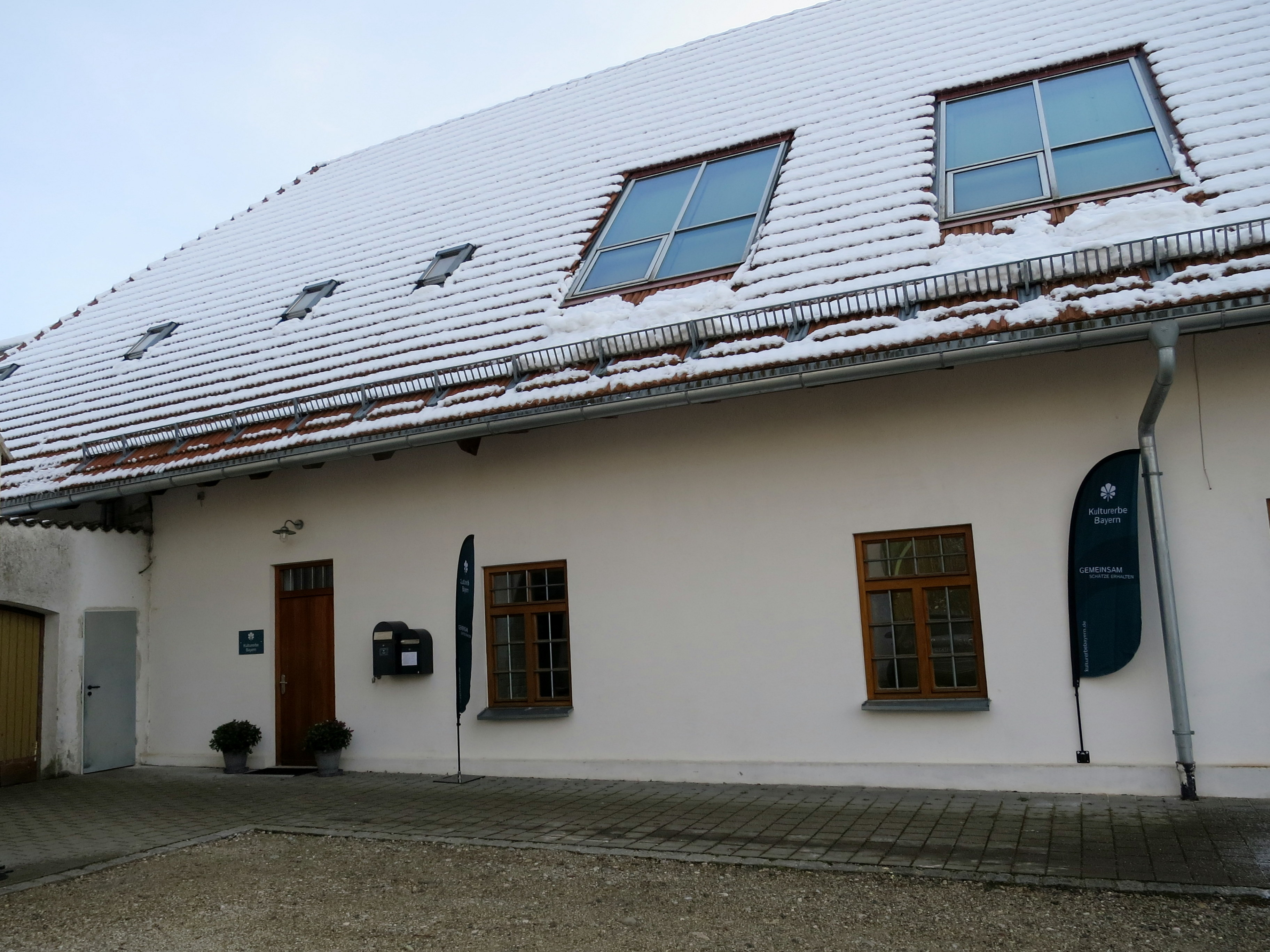 Hofseite der Geschäftsstelle in Sulzemoos